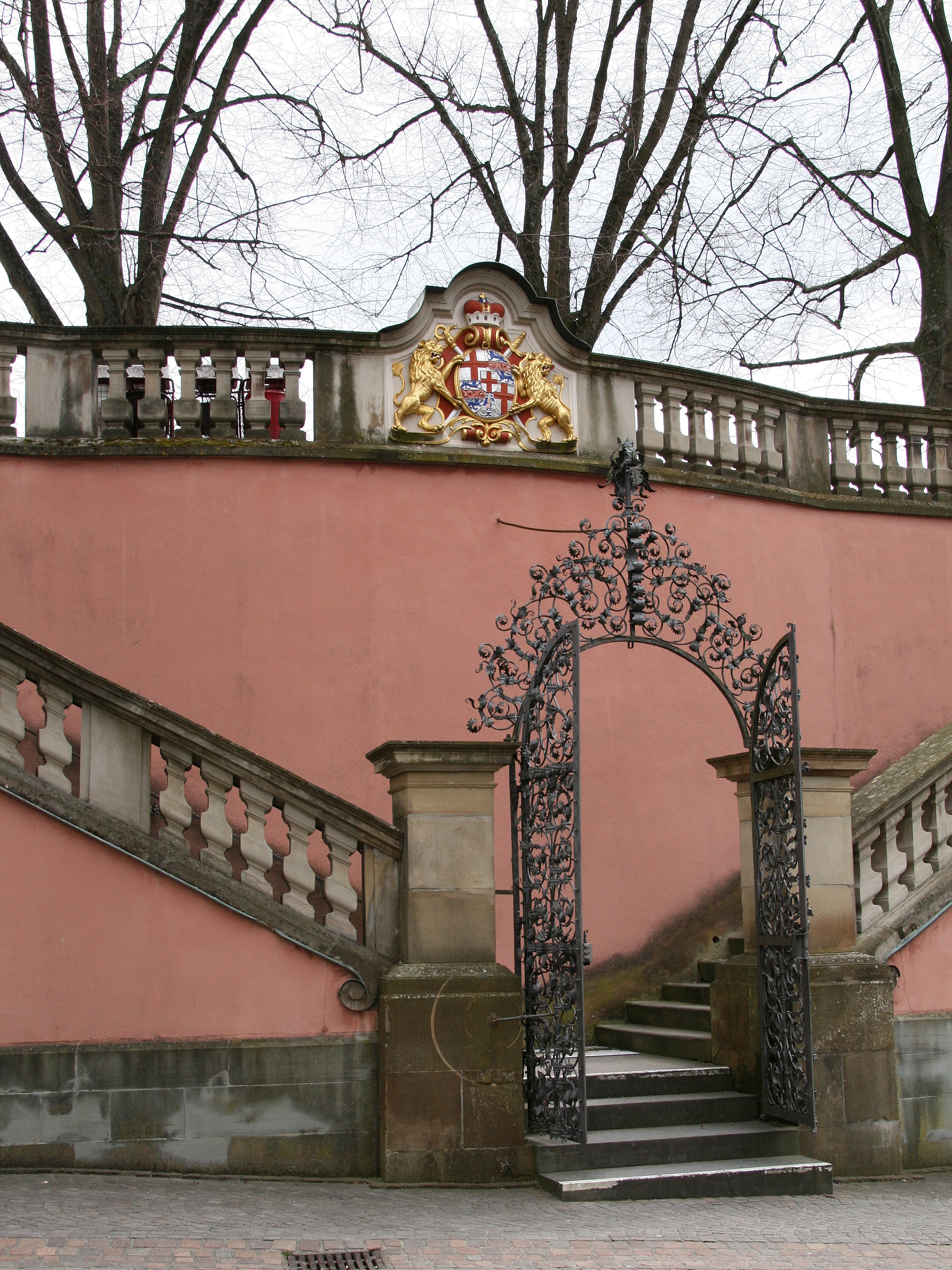 Das Neue Schloss (Meersburg) in Meersburg. Hier der Stiegenaufgang in den Schlossgarten; Blick von der Westseite. Oben das Wappen des Fürstbischofes Johann Franz Schenk von Stauffenberg.